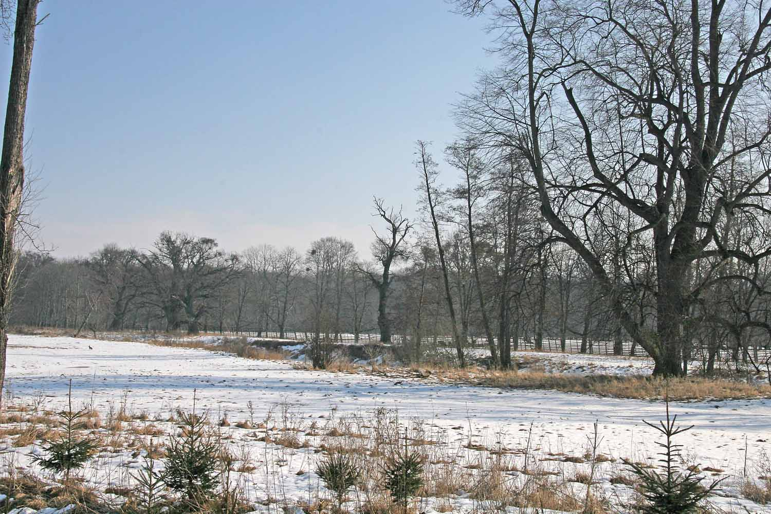 Pohled na staré duby v Žehušické oboře